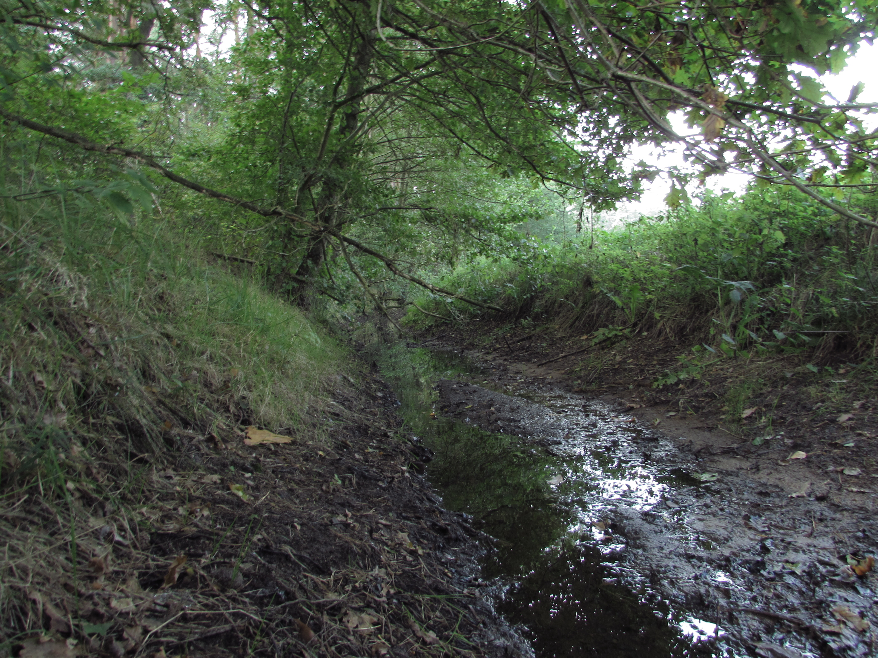 Kirchenheider Bach zwischen Köpernitz und Dretzen